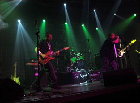 Tensa Espera... durante su actuación en la Sala TAF 2008